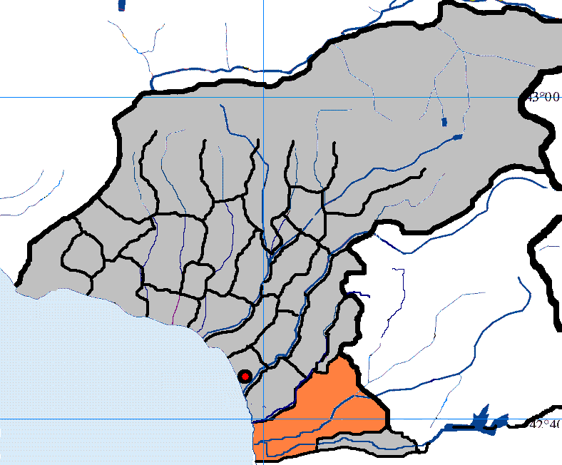 село Ачигвара в Очамчирском районе